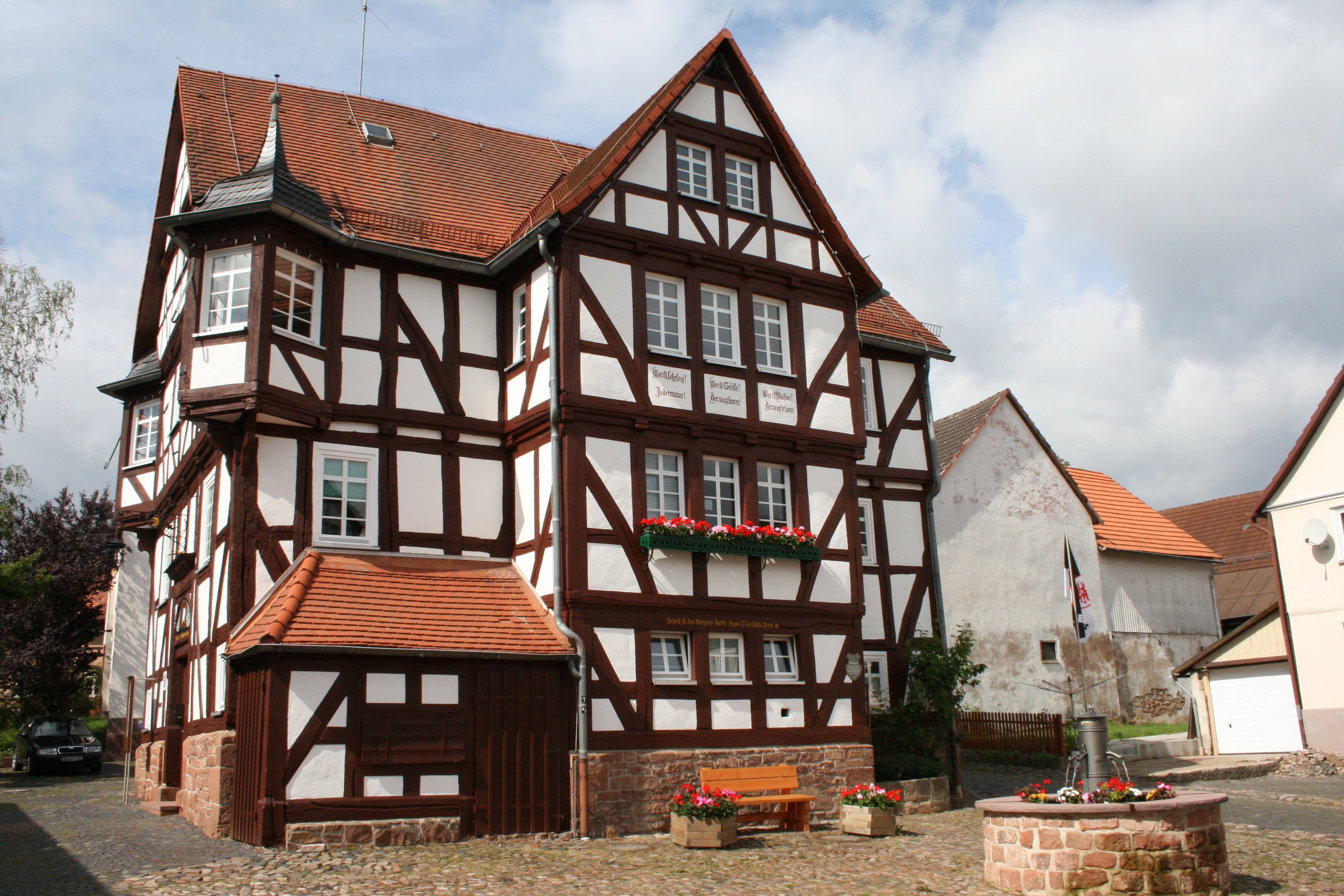 Rathaus in 35119 Rosenthal, Deutschland, Adresse: Am Rathaus 2